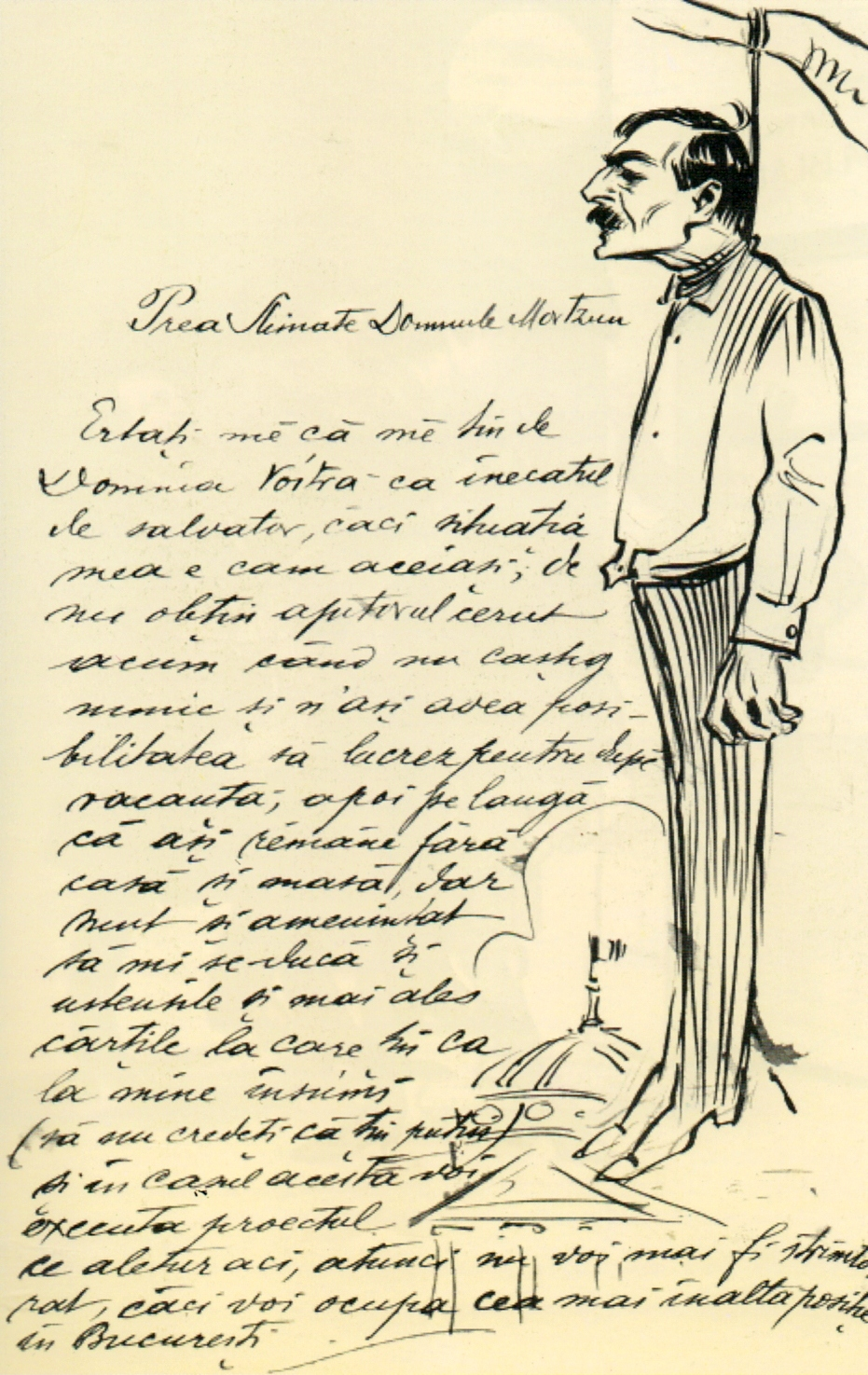 Scrisoare cu autoportret spânzurat, către Vasile G. Morțun